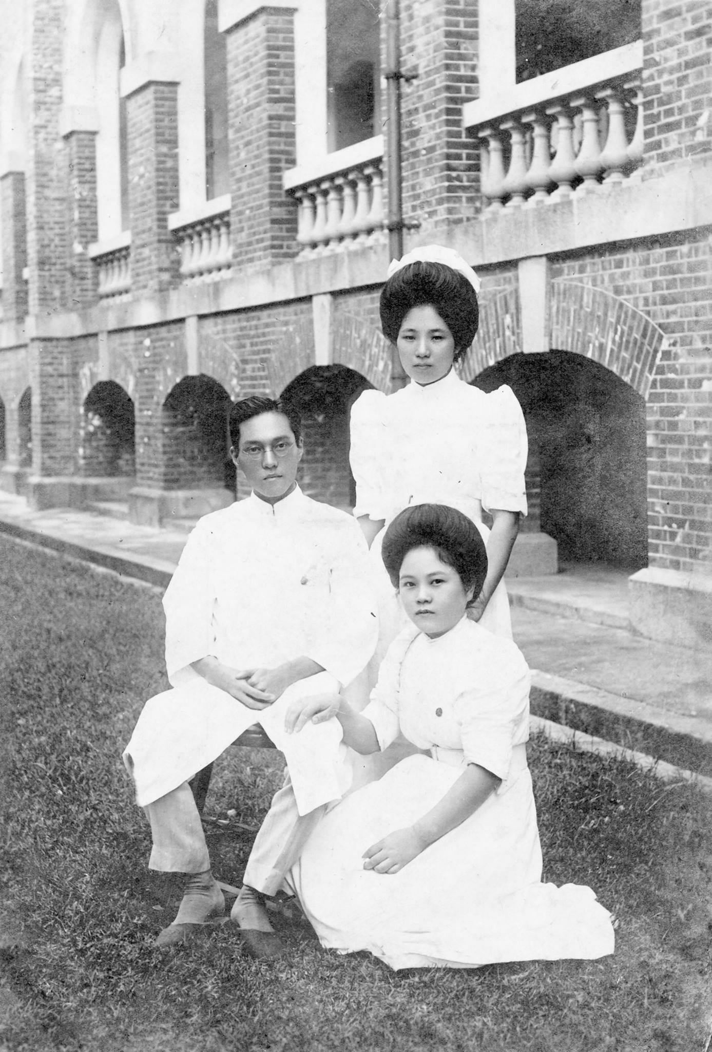 高敬遠醫官與護士，攝於臺北醫院（今臺大醫院）。